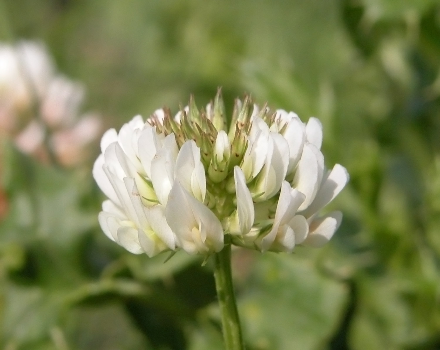 Weiss-Klee Blüte Eigene Aufnahme Nikon CP5700 F/8 1/500 ISO200